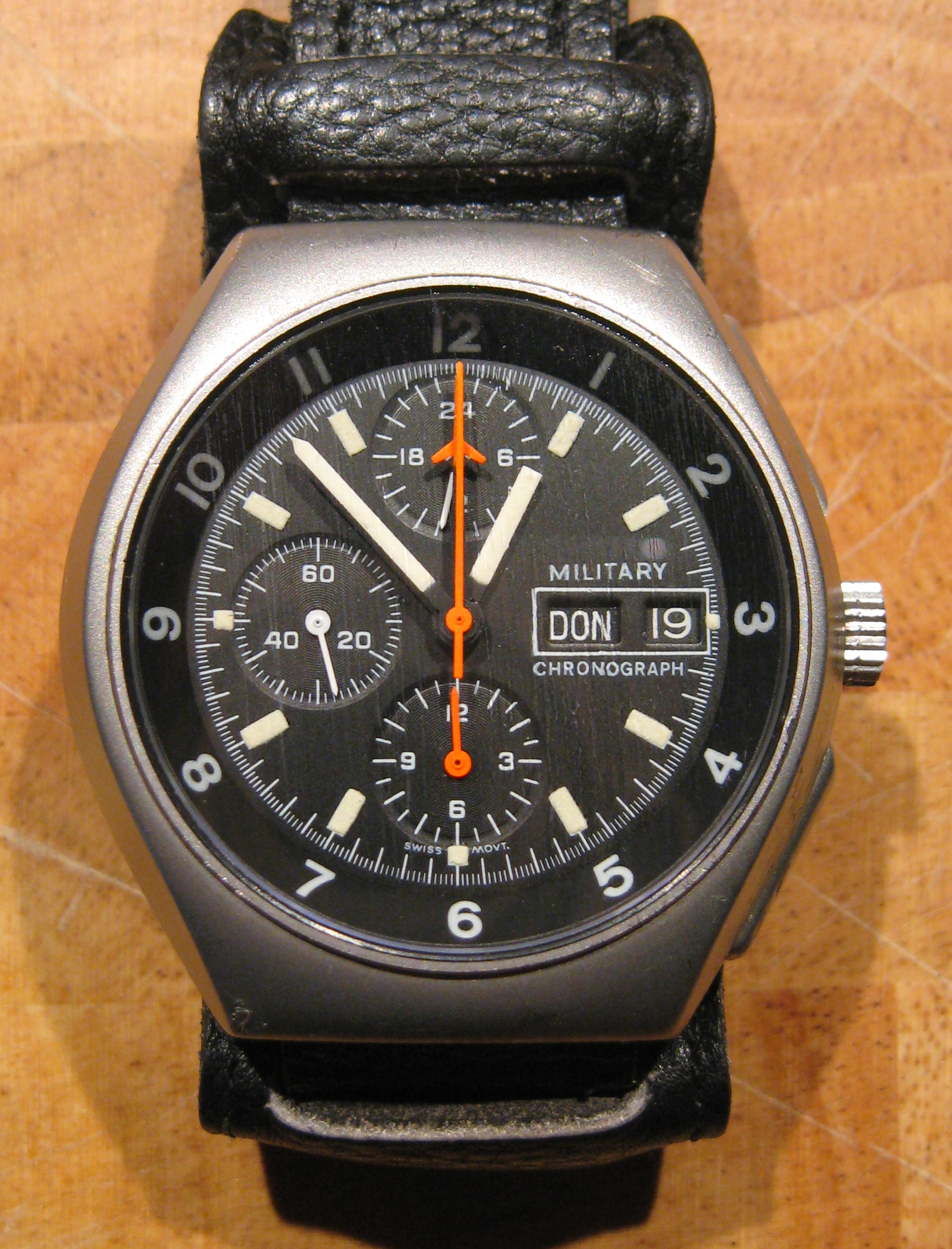 Tutima Fliegerchronograph (Bundeswehr Luftwaffe) Datum: 19.03.2011 Urheber: M. Pfeiffer alias Benutzer:Gordito1869 Quelle: privates Fotoarchiv des Urhebers